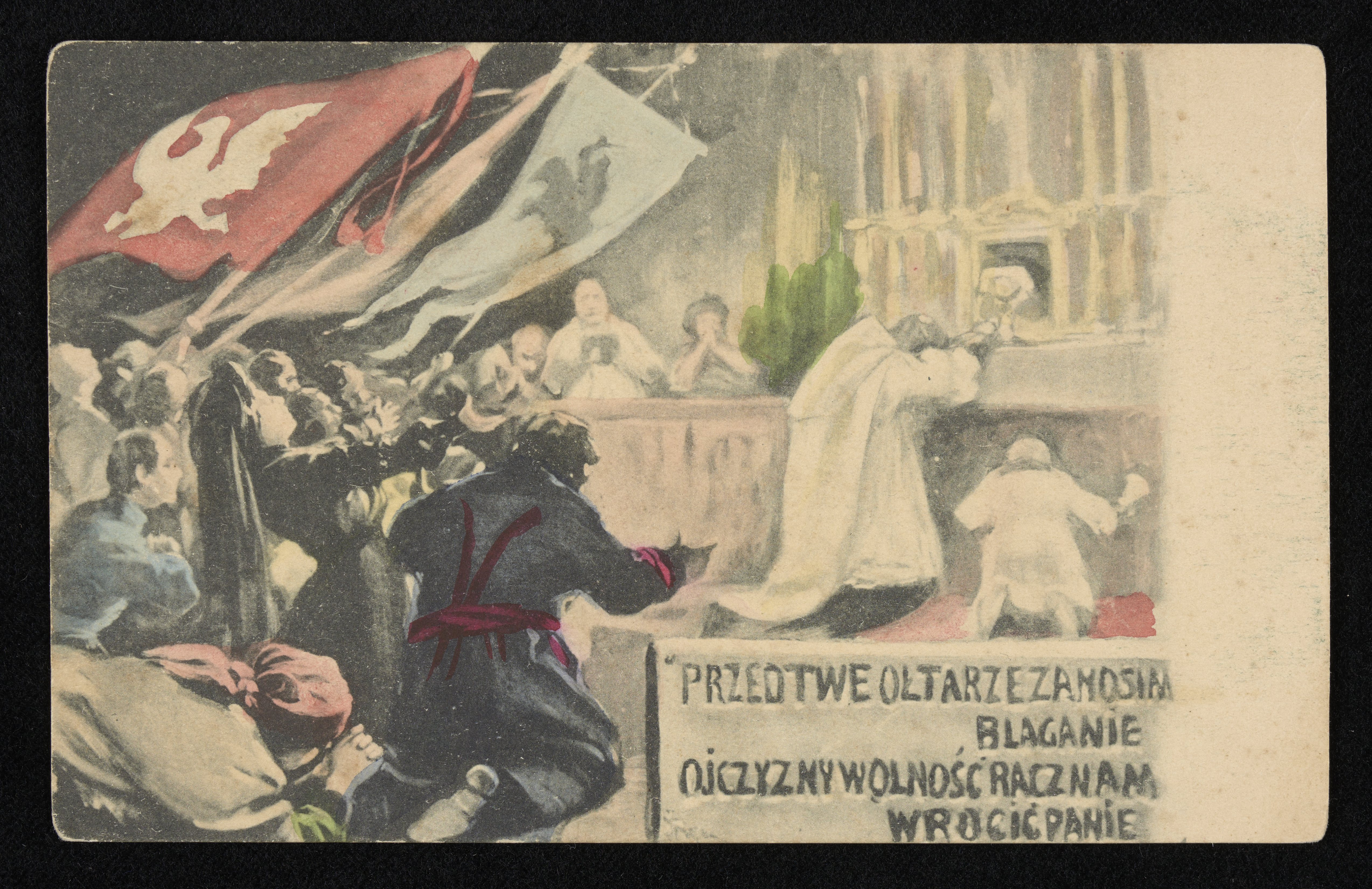 Pocztówka z tekstem pieśni "Boże coś Polskę", [1906-1912]